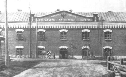 Александровский Централ — центральная каторжная тюрьма Российской империи. село Александровское, около Иркутска. начало XX века.)